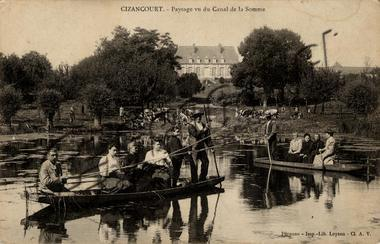 Carte postale des marais de Cizancourt datant des années 1930.